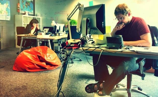 Программисты в офисе "Яндекса".